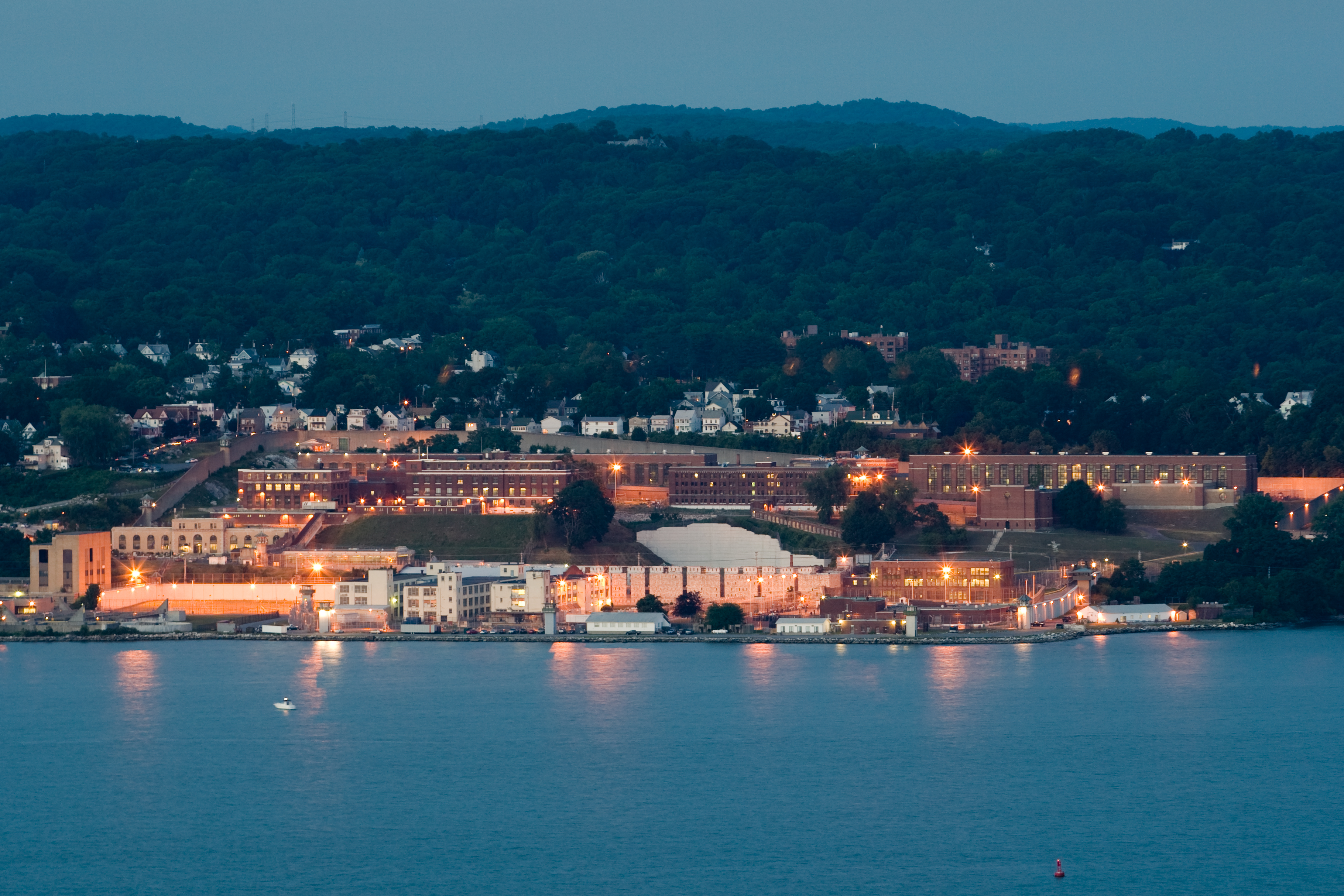 Sing Sing prison as seen from Rockland Lake State Park